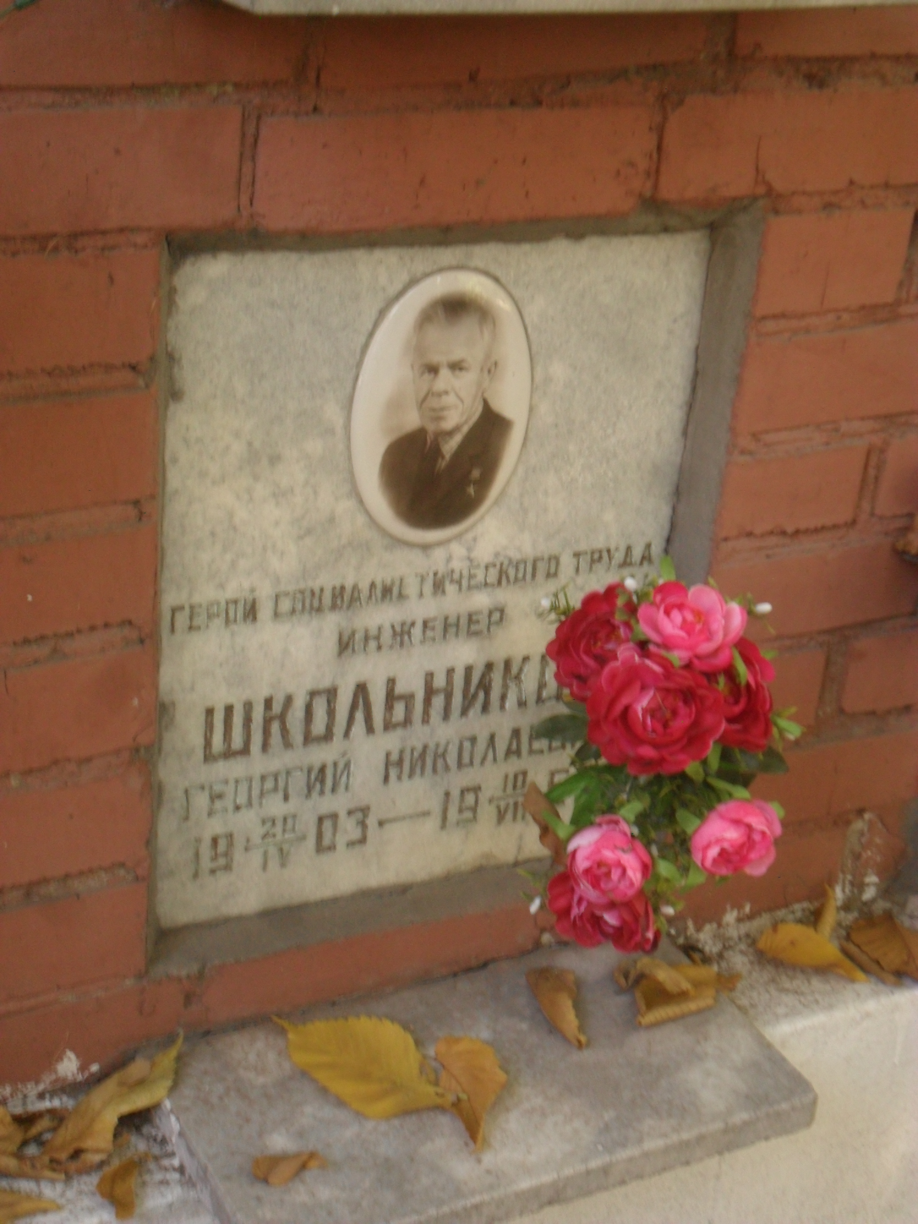 Плита колумбария Героя Социалистического Труда Георгия Школьникова на Новодевичьем кладбище Москвы.